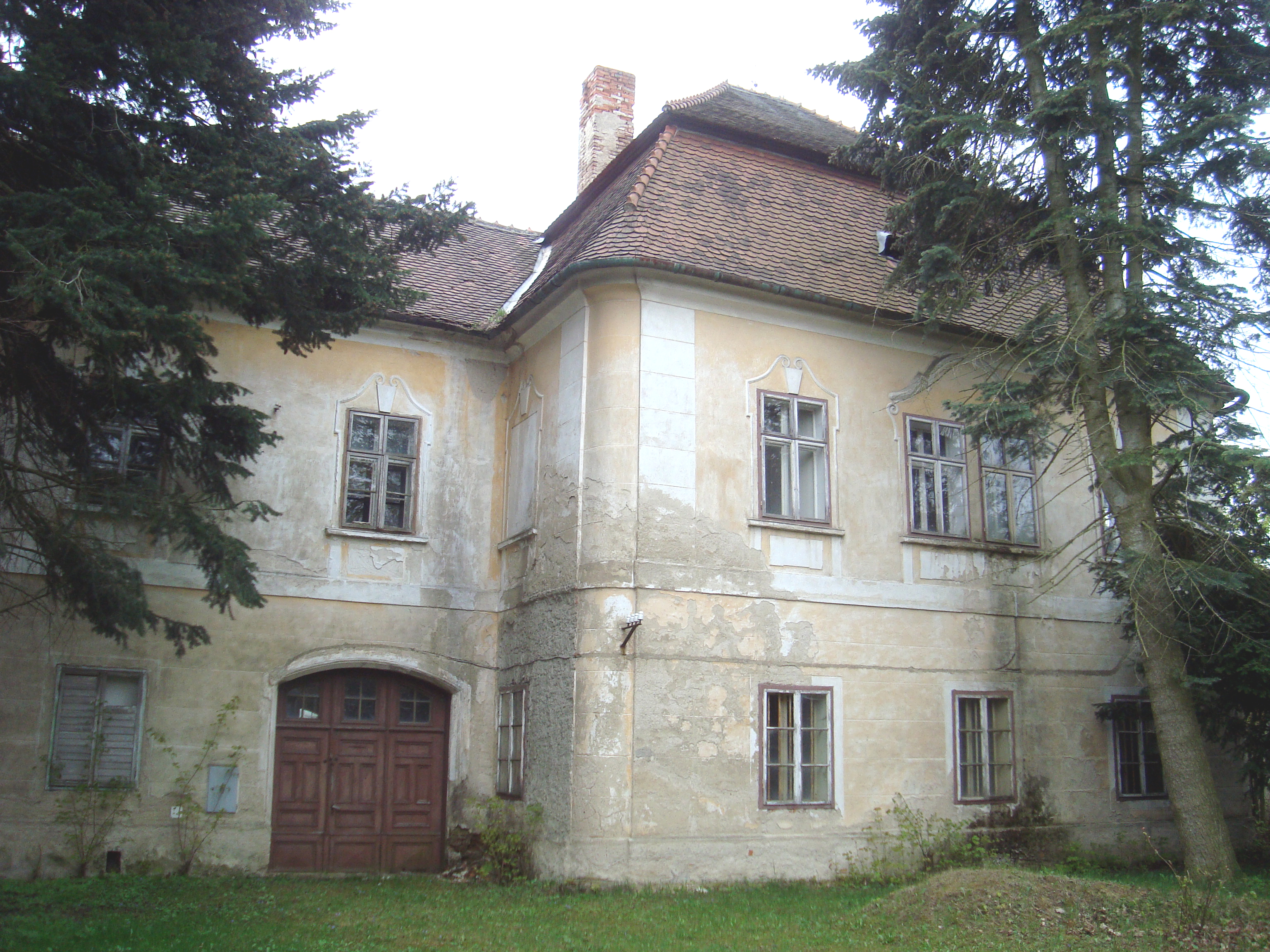 Zámek Lesní Hluboké